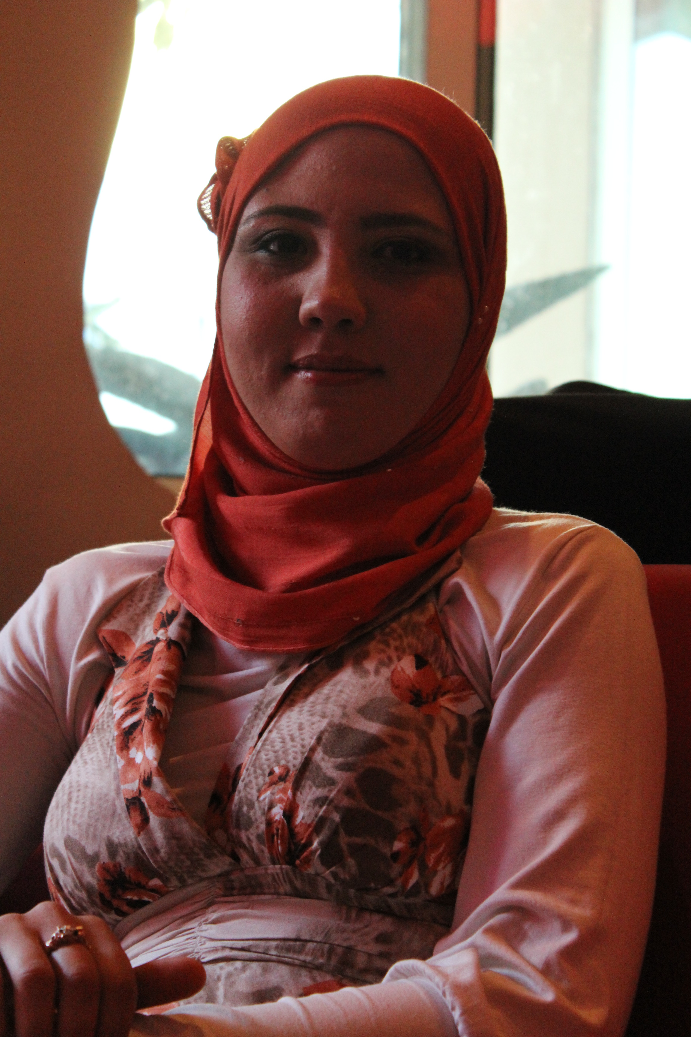 Hijjab Tunisie This is an image of Cultural Fashion or Adornment from Tunisia